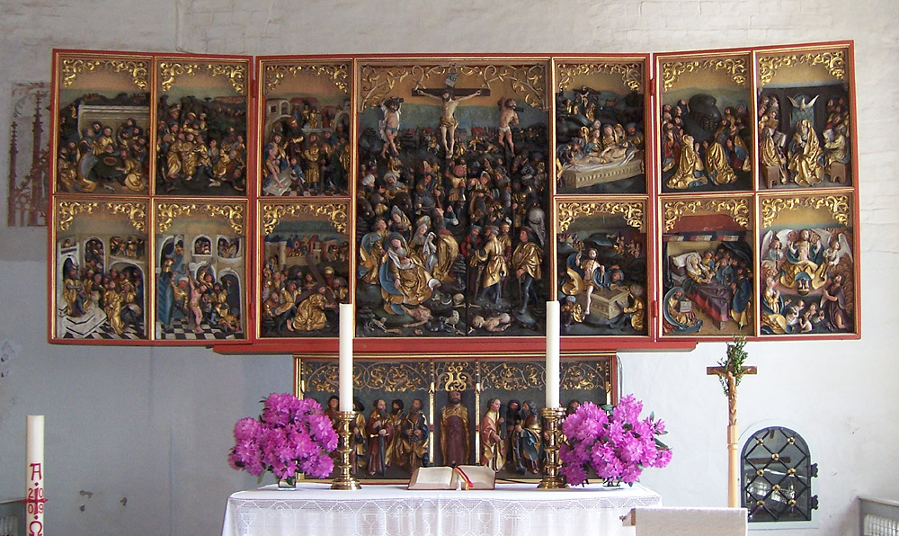 evangelisch-lutherische Pfarrkirche St. Johannes der Täufer in Bad Zwischenahn. Flügelaltar, Eichenholz, geschnitzt um 1520 vermutlich von einem unbekannten Osnabrücker Meister. Die Ölfarbenfassung ist von 1780. Darstellungen linke Seite: Einsetzung des Hl. Abendmahls - Verrat des Judas - Jesus vor dem hohen Rat .-Geißelung - Dornenkrönung und Verspottung - Kreuztragung. Hauptbild in der Mitte des Schreins: Kreuzigung. Rechte Seite: Kreuzabnahme und Grablegung - Auferstehung -Himmelfahrt - Ausgießung des Hl. Geistes - Tod Mariens - Christus der Weltenrichter (Jüngstes Gericht). Quelle